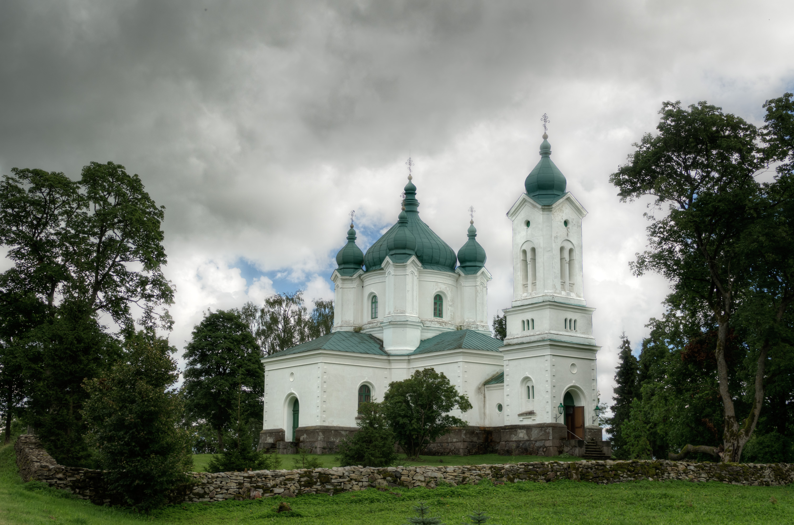 Tornimäe Neitsi Maarja Kaitsmise kirik Saaremaal